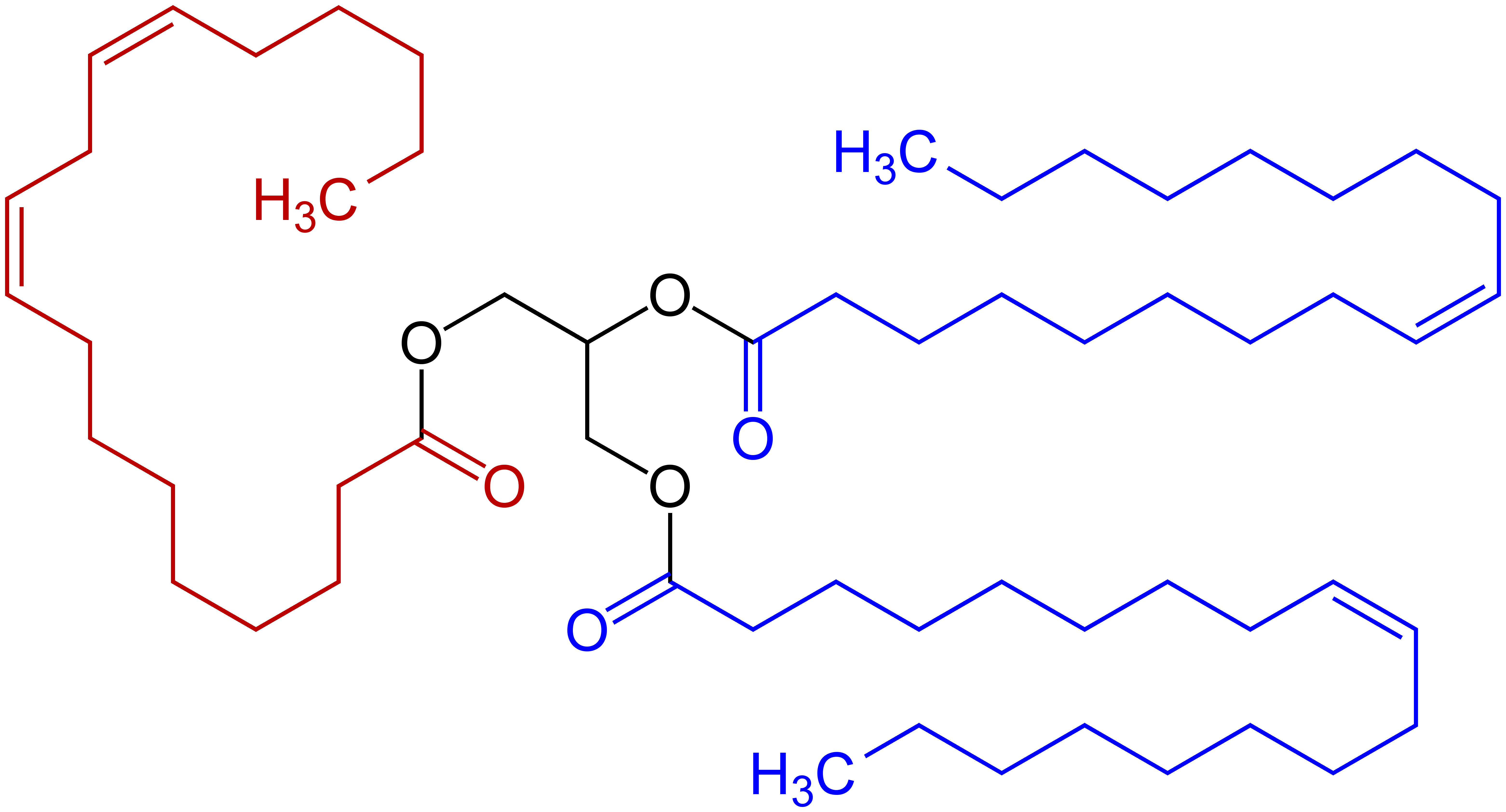 Triglycerid mit zwei (blauen) Ölsäureresten